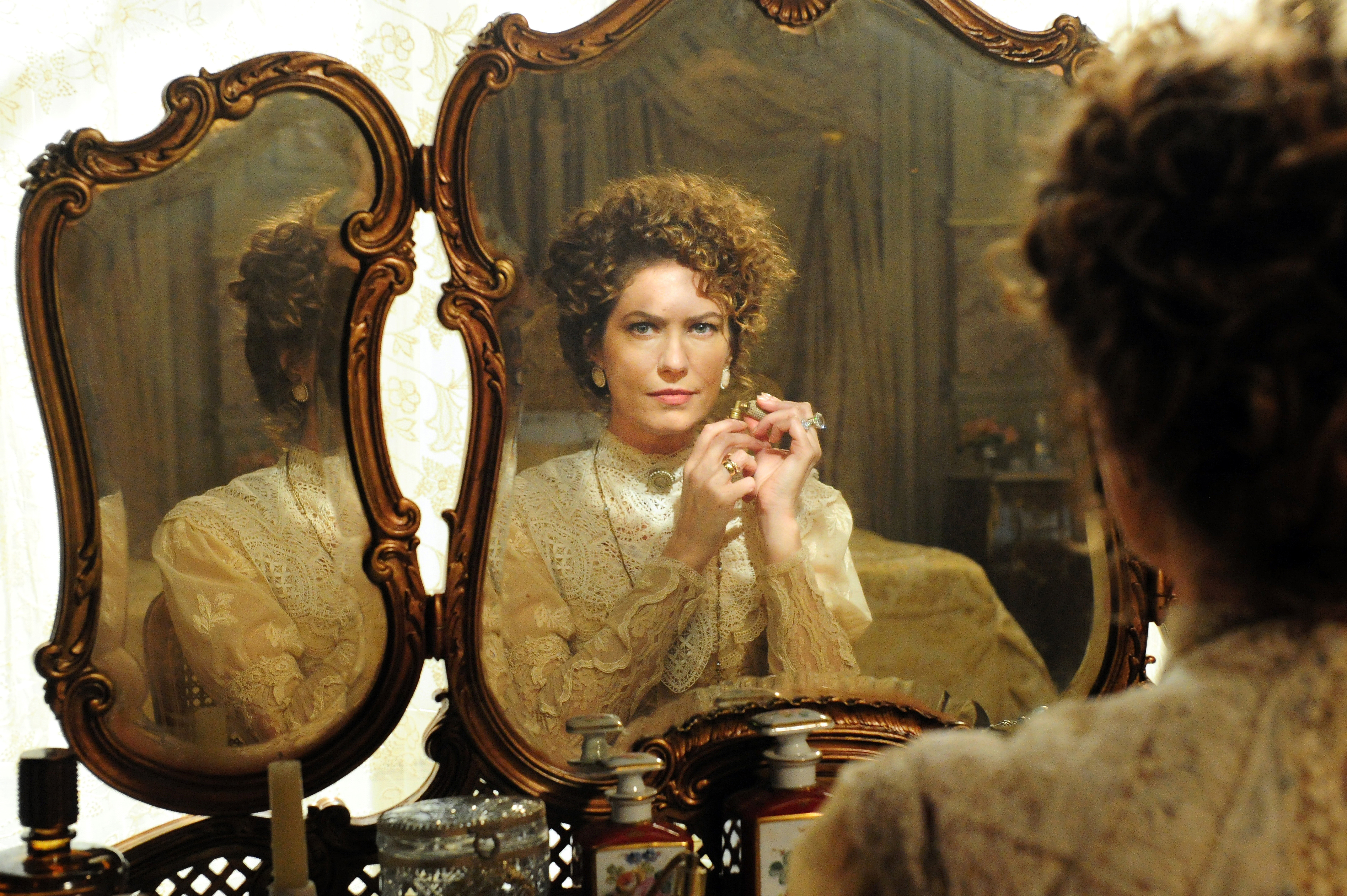 Atriz Patrícia Pillar.